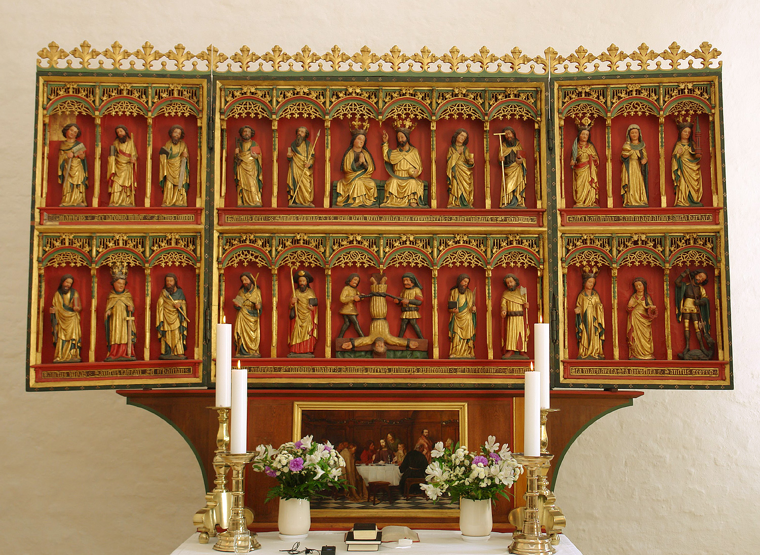 St.-Peter-Kirche in Højer: gotischer Flügelaltar von 1425, wahrscheinlich aus einer Lübecker Werkstatt.